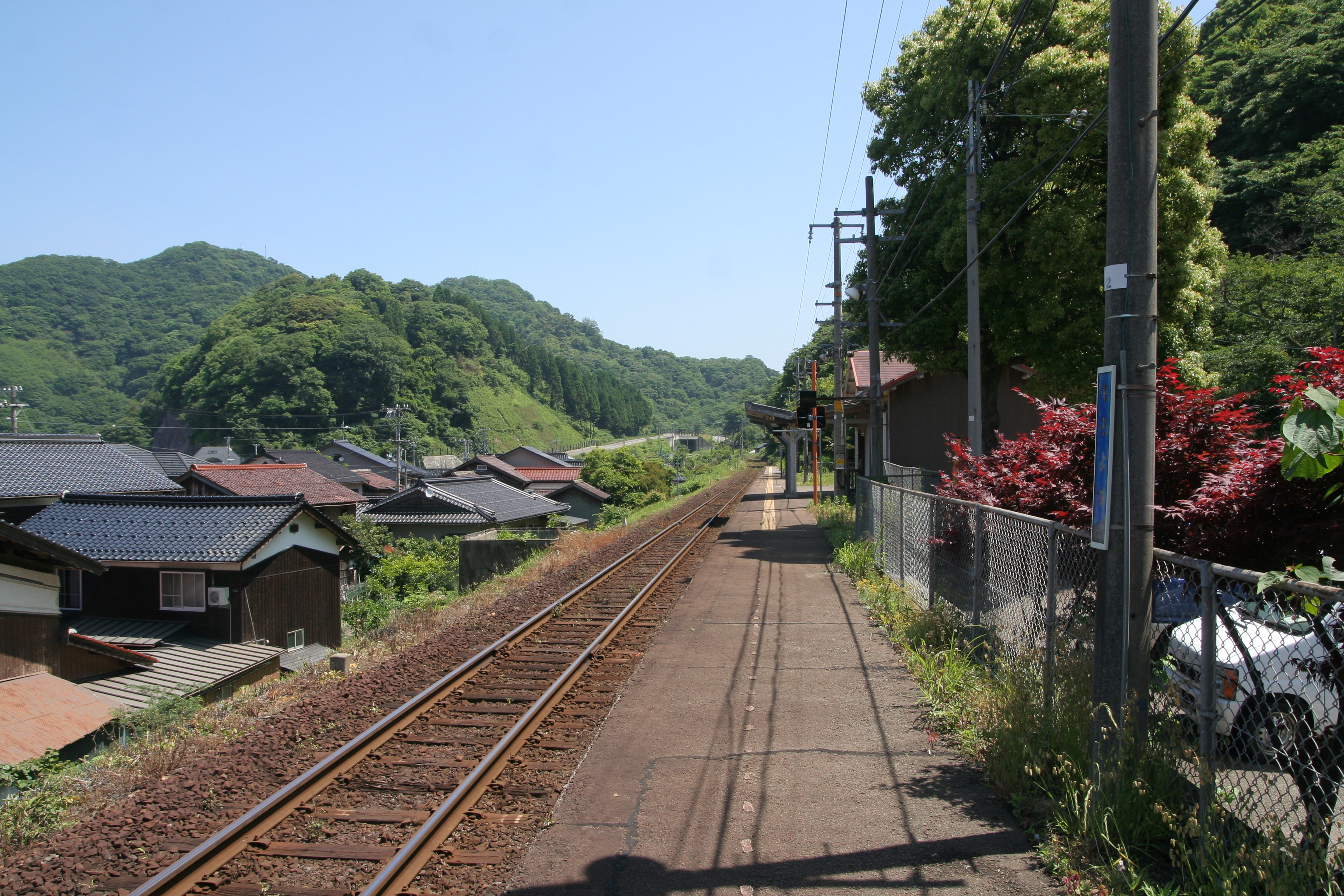 JR西日本 諸寄駅の構内（浜坂方面）